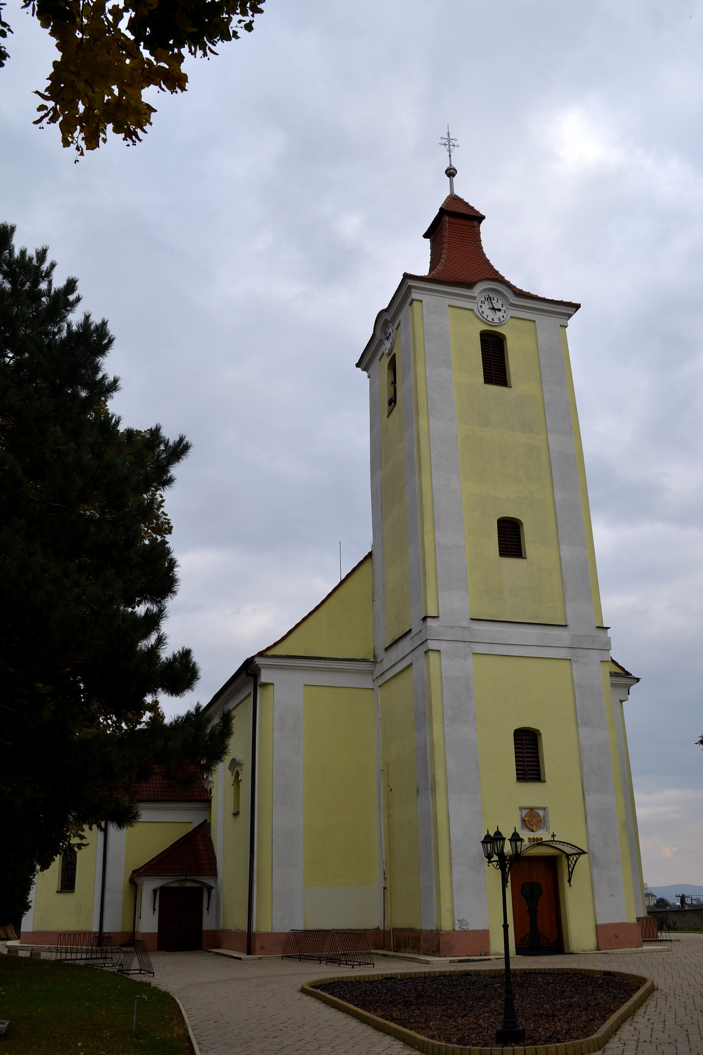 Podolie (okr. Nové Mesto nad Váhom), Kostol svätého Juraja, pohľad od západu